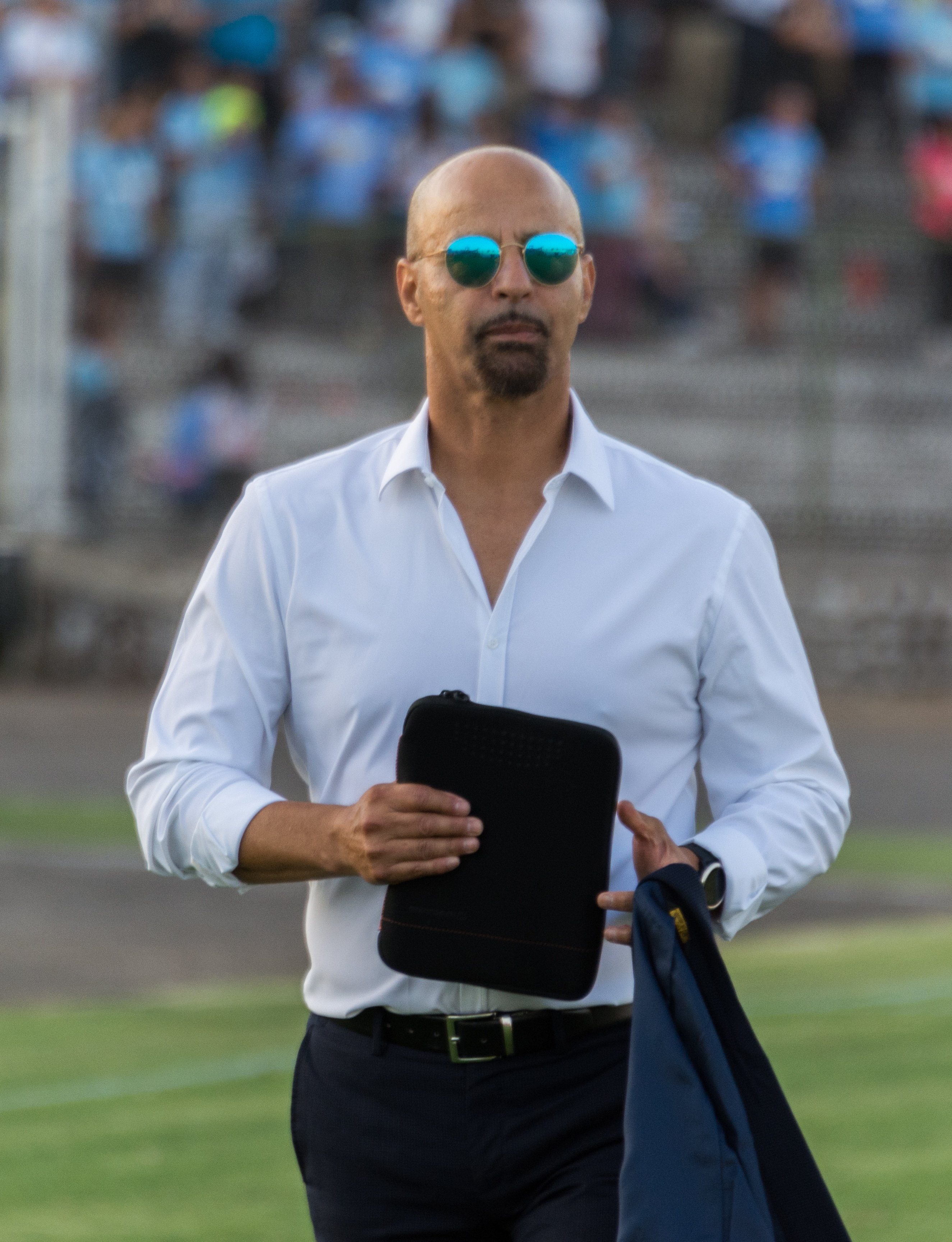 Marco Antonio Figueroa, Palestino v O'Higgins, Estadio Municipal de La Cisterna, La Cisterna, Santiago, Chile.